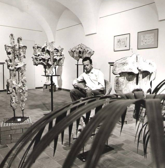 Mostra anni 60 gruppo artistico Ruscel